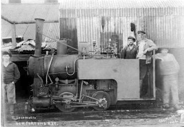 Locomotora de la estación ballenera de Puerto Nueva Fortuna (Ocean Harbour / New Fortuna Bay), Georgia del Sur, hacia los años 1910